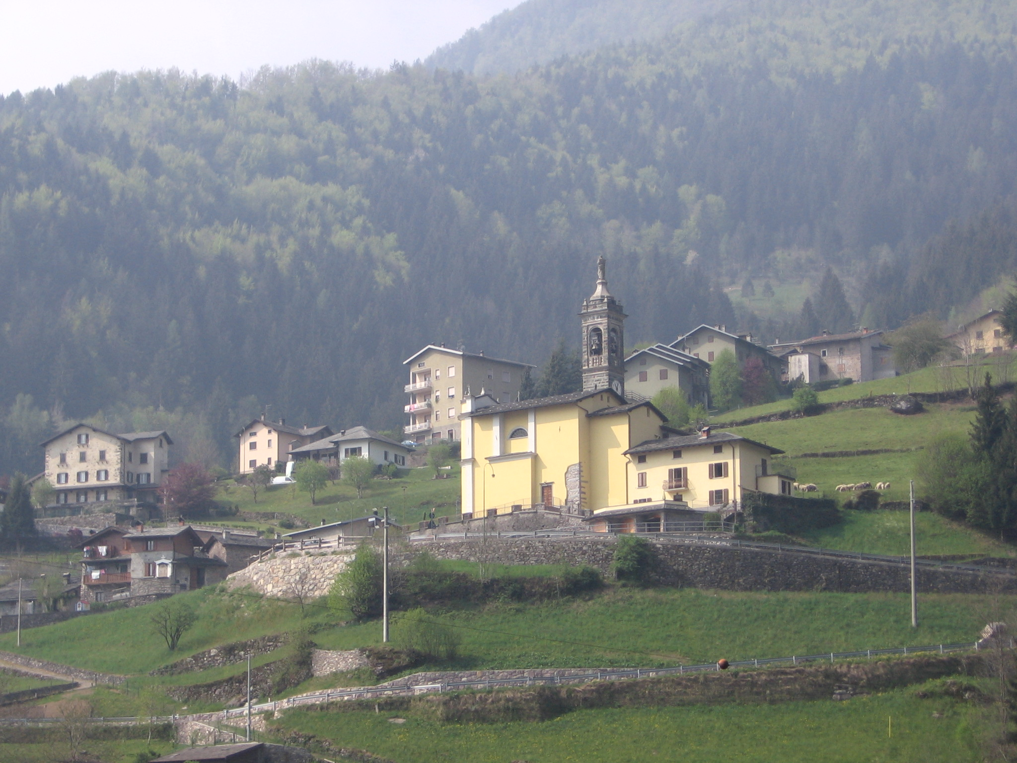 Valgoglio, fraz.Novazza, Bergamo, Italia